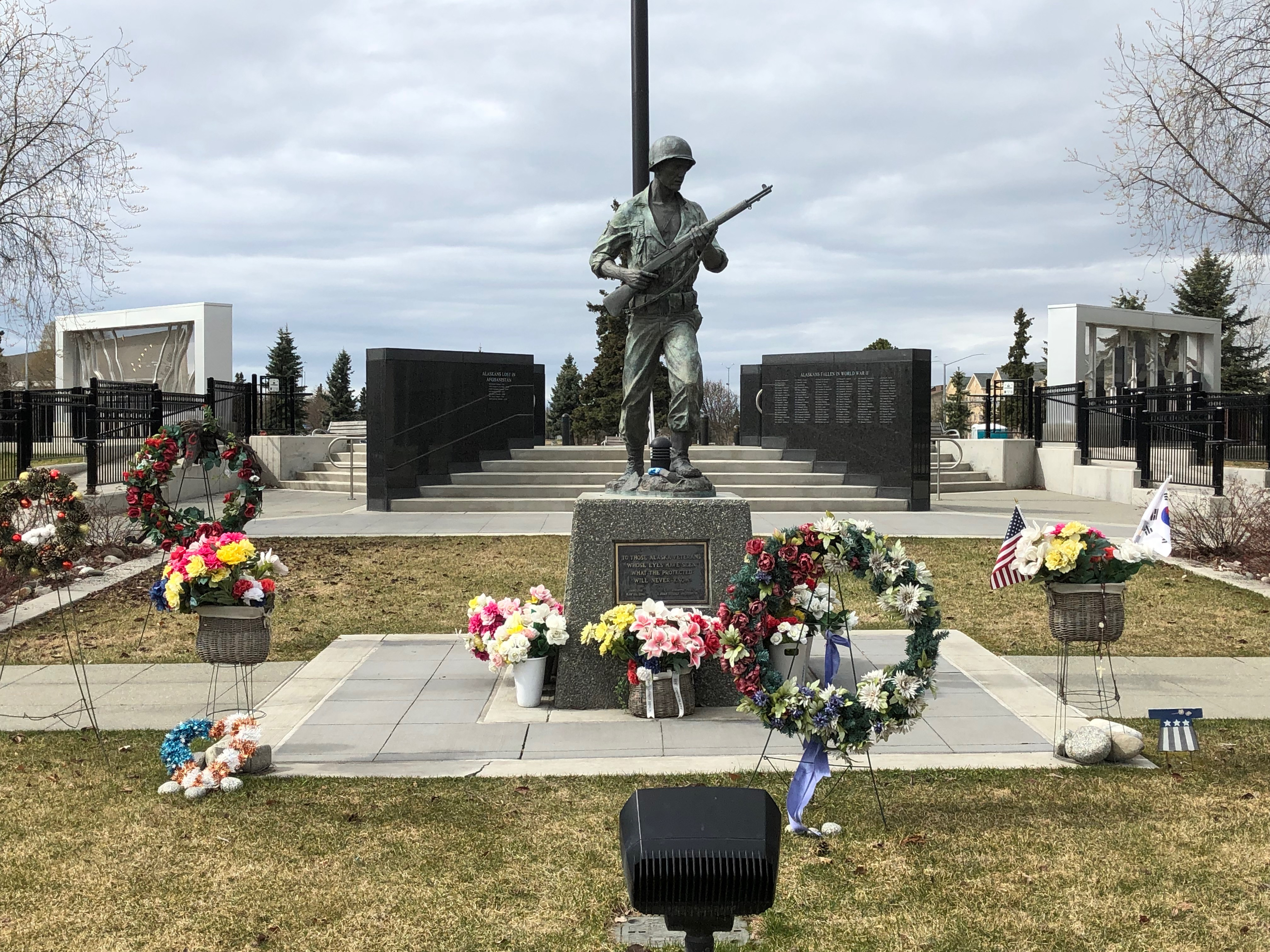 Alaskan Veterans Memorial at Delaney Park Strip.